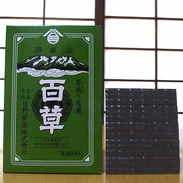 御嶽山百草（板）：日野製薬 中身とパッケージ